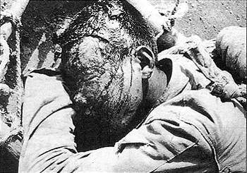 1941年日军扫荡使冀鲁豫根据地损失严重